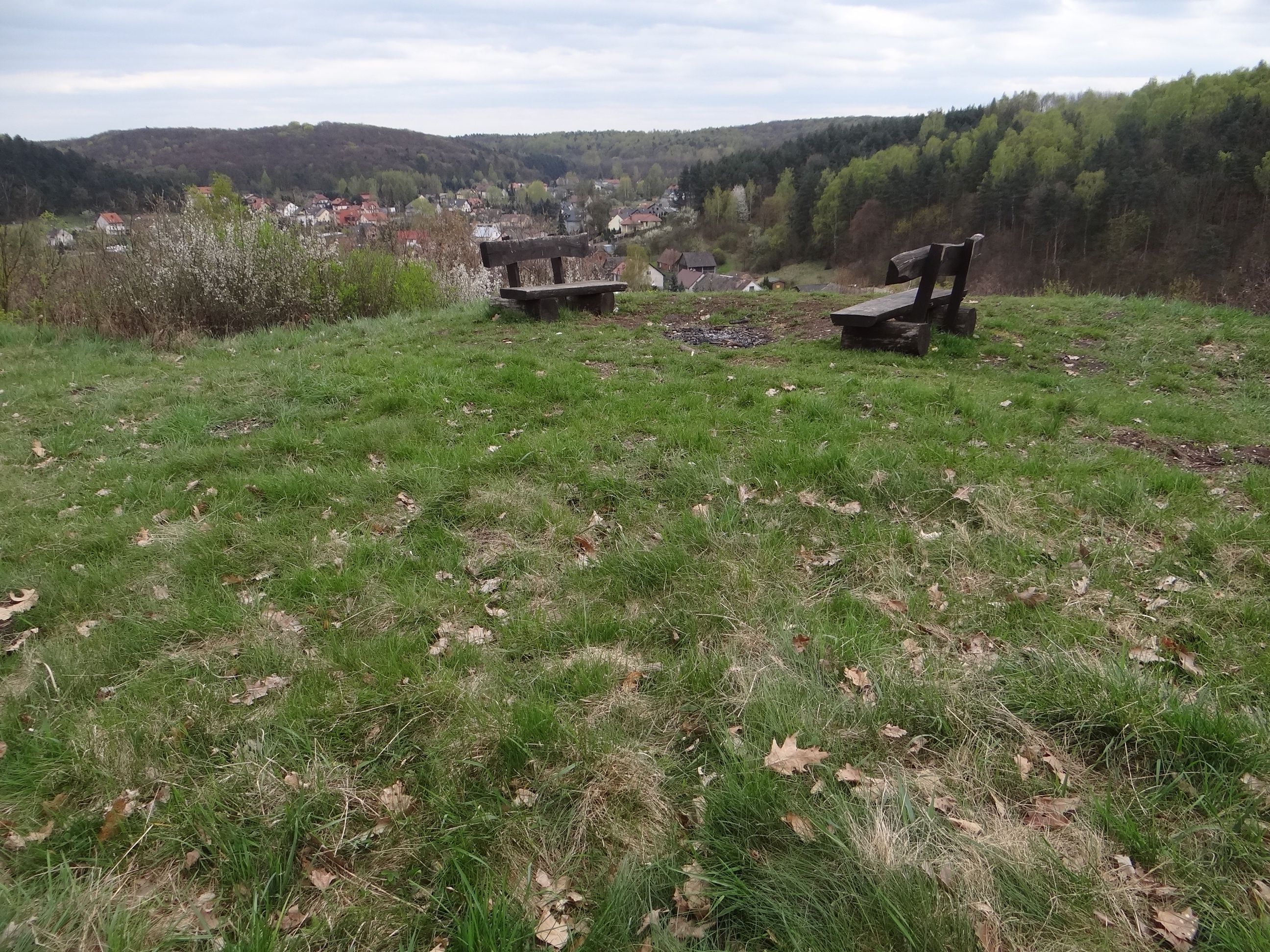 Szczyt wzgórza Wielkanoc w Tyńcu